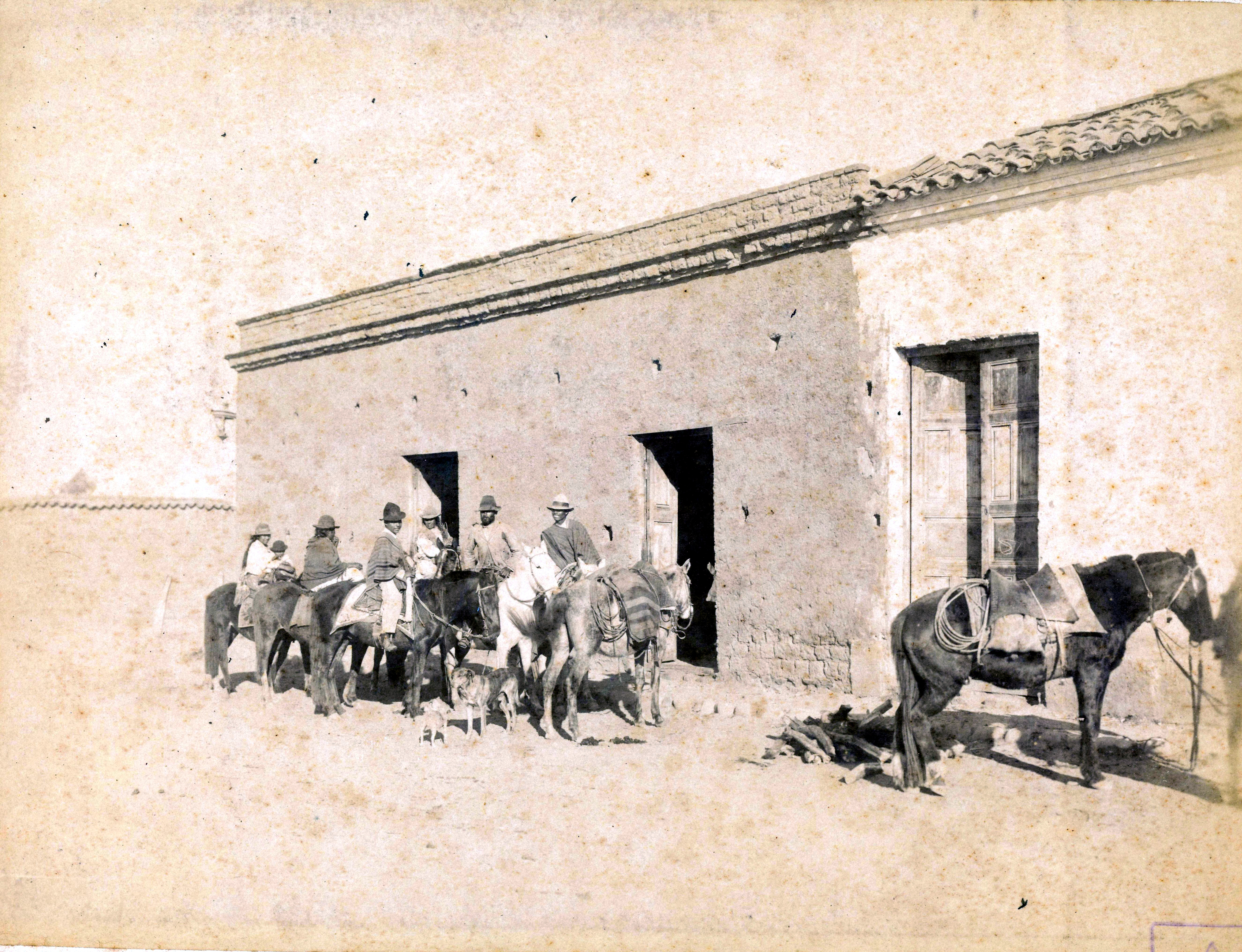 Jinetes en la puna, siglo XIX. Documento fotográfico. 213270. General Archive of the Nation (Argentina) Native nameArchivo General de la Nación ArgentinaLocationBuenos Aires, ArgentinaEstablished28 August 1821Website control : Q2860529 This file, was provided to Wikimedia Commons thanks to an agreement between the General Archive of the Nation of Argentina and Wikimedia Argentina.